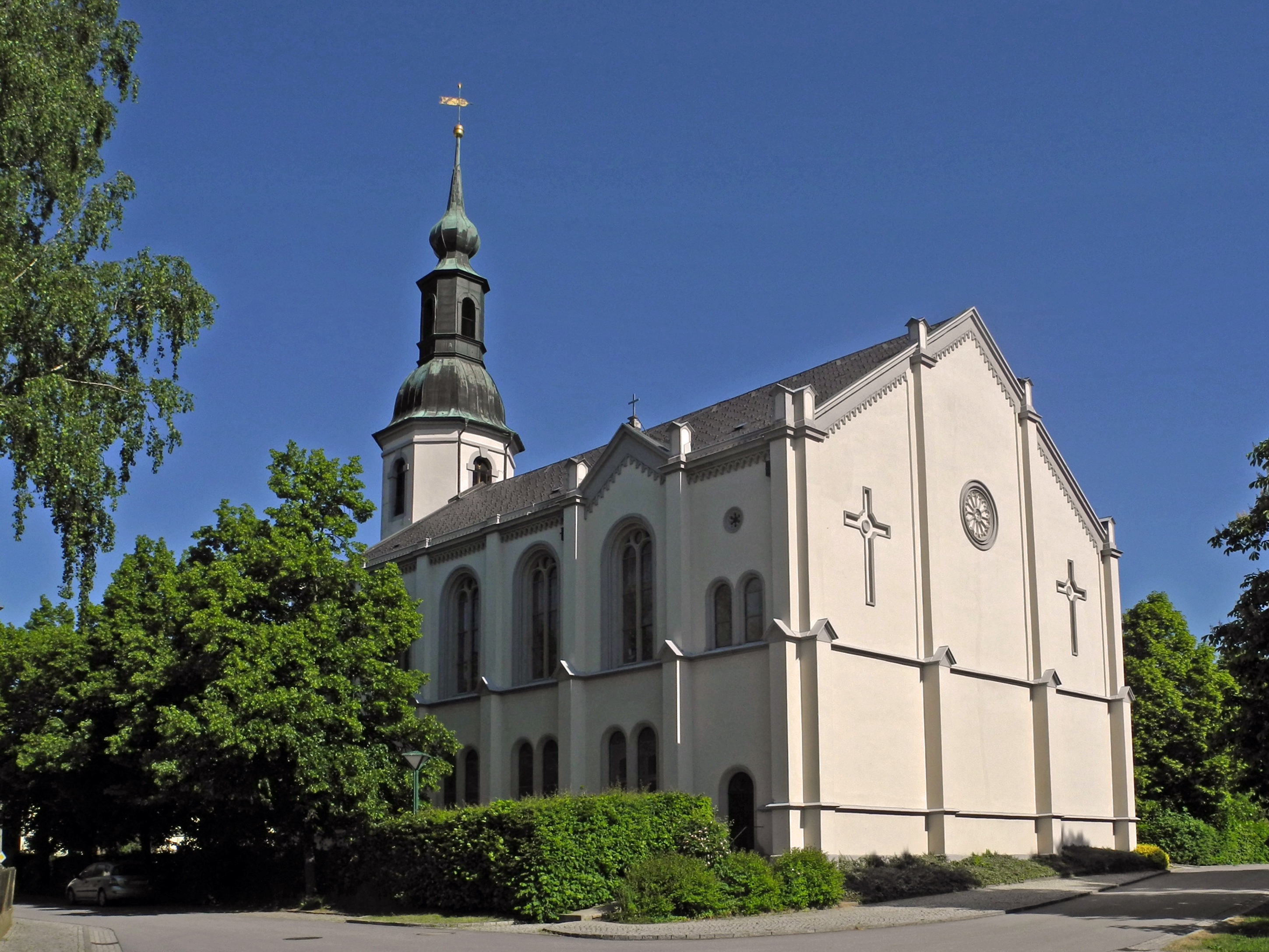 Martinskirche in Gaußig